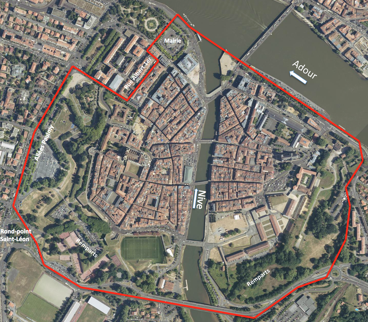 Bayonne - Secteur sauvegardé et mis en valeur